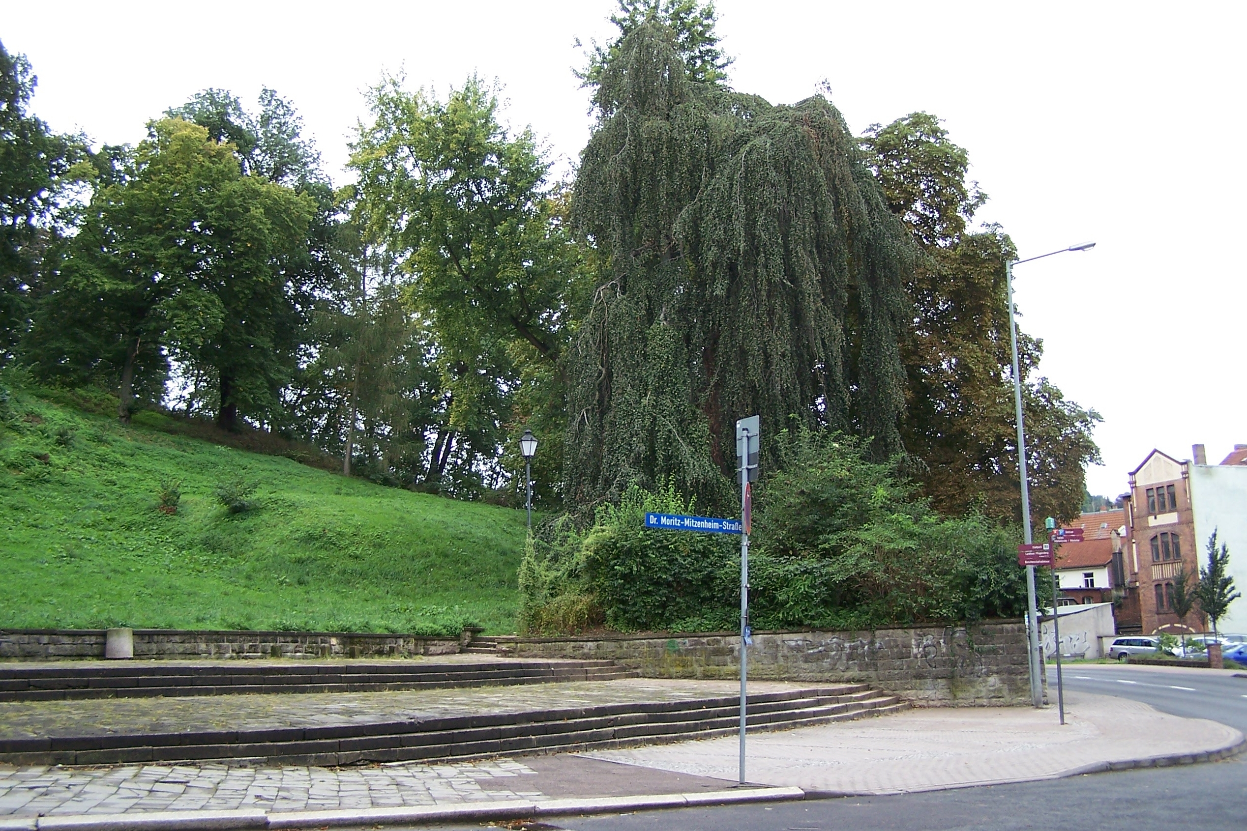 An der Einmündung der Dr.-Moritz-Mitzenheim-Straße in die Wartburgallee befand sich bis nach Kriegsende das Denkmal für Reichskanzler Otto von Bismarck, nach dem Abbau des Denkmals verschwand in den 1960er Jahren auch der Denkmalssockel, an seiner Stelle wurde eine Sitzecke angelegt.